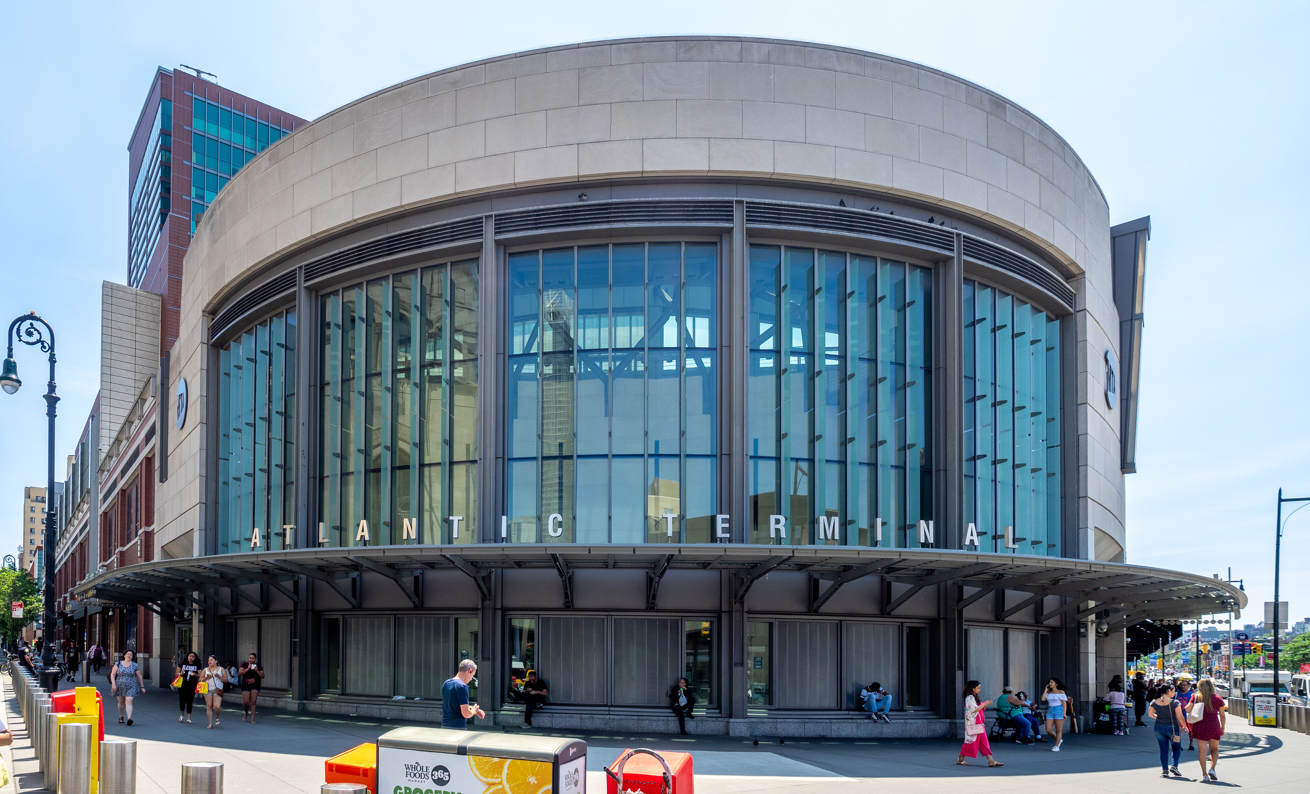 Brooklyn